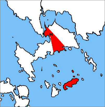 Karta Mogenpört (by)